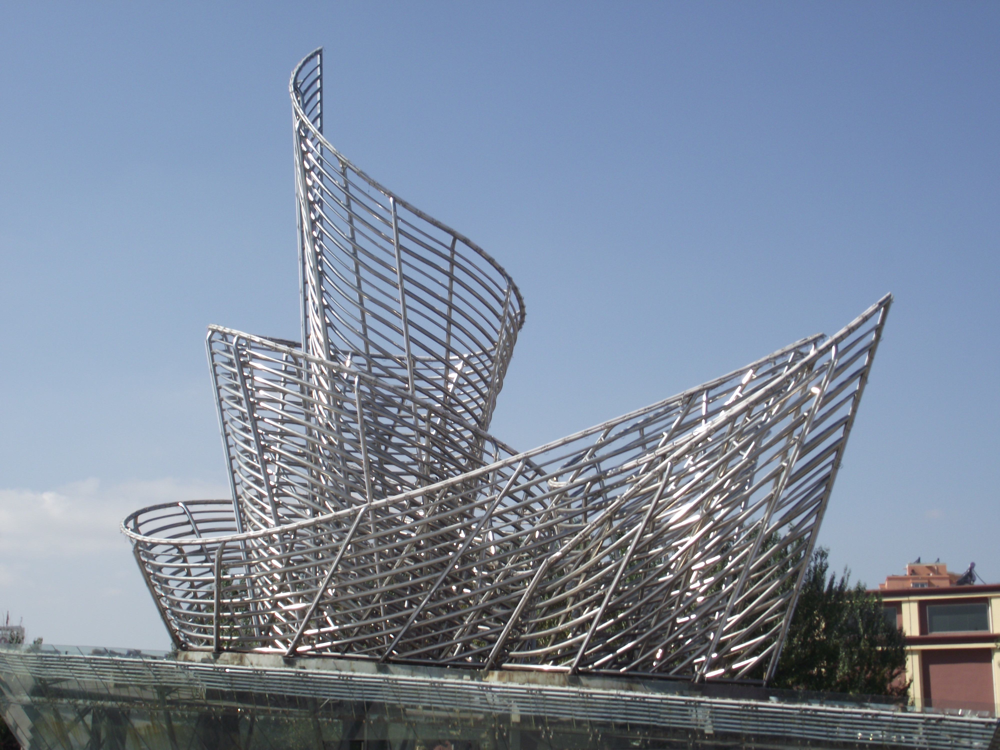 松花江景区起航楼DSCF0145